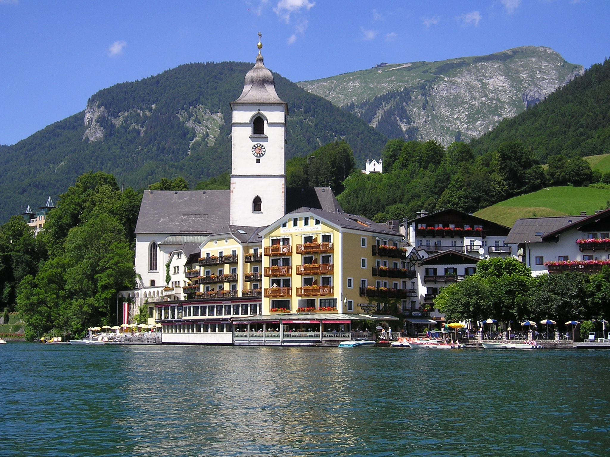 Sankt Wolfgang am Wolfgangsee mit Kirche und Hotel Weißes Rössl